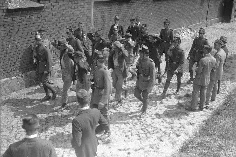 Ausbildung der preussischen Schutzpolizei in der Polizeischule in Brandenburg a/Havel. Aufständige werden abgeführt, eine Uebung der jungen Polizeibeamten in der Polizeischule.